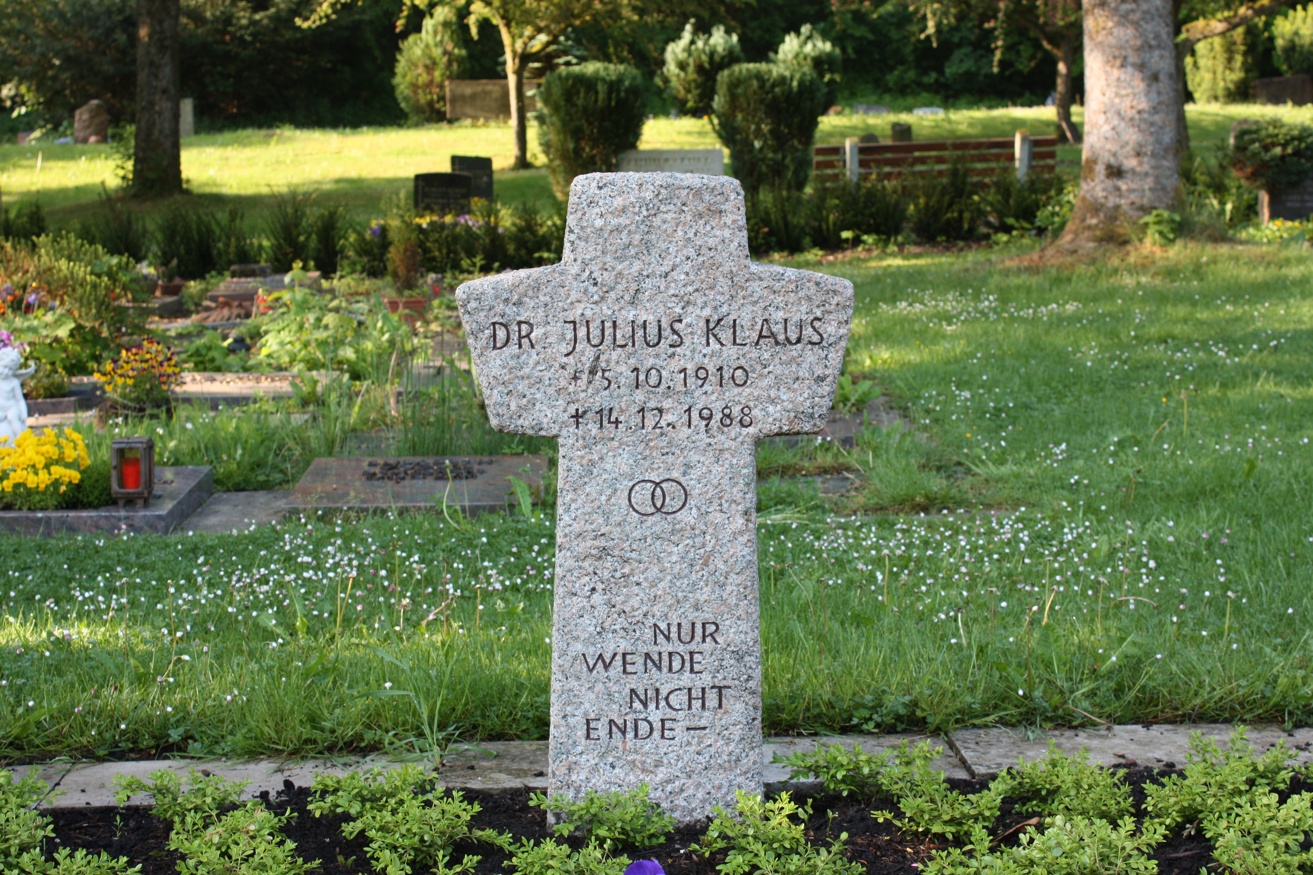 Grabmal von Dr. Julius Klaus auf dem Dreifaltigkeitsfriedhof in Schwäbisch Gmünd